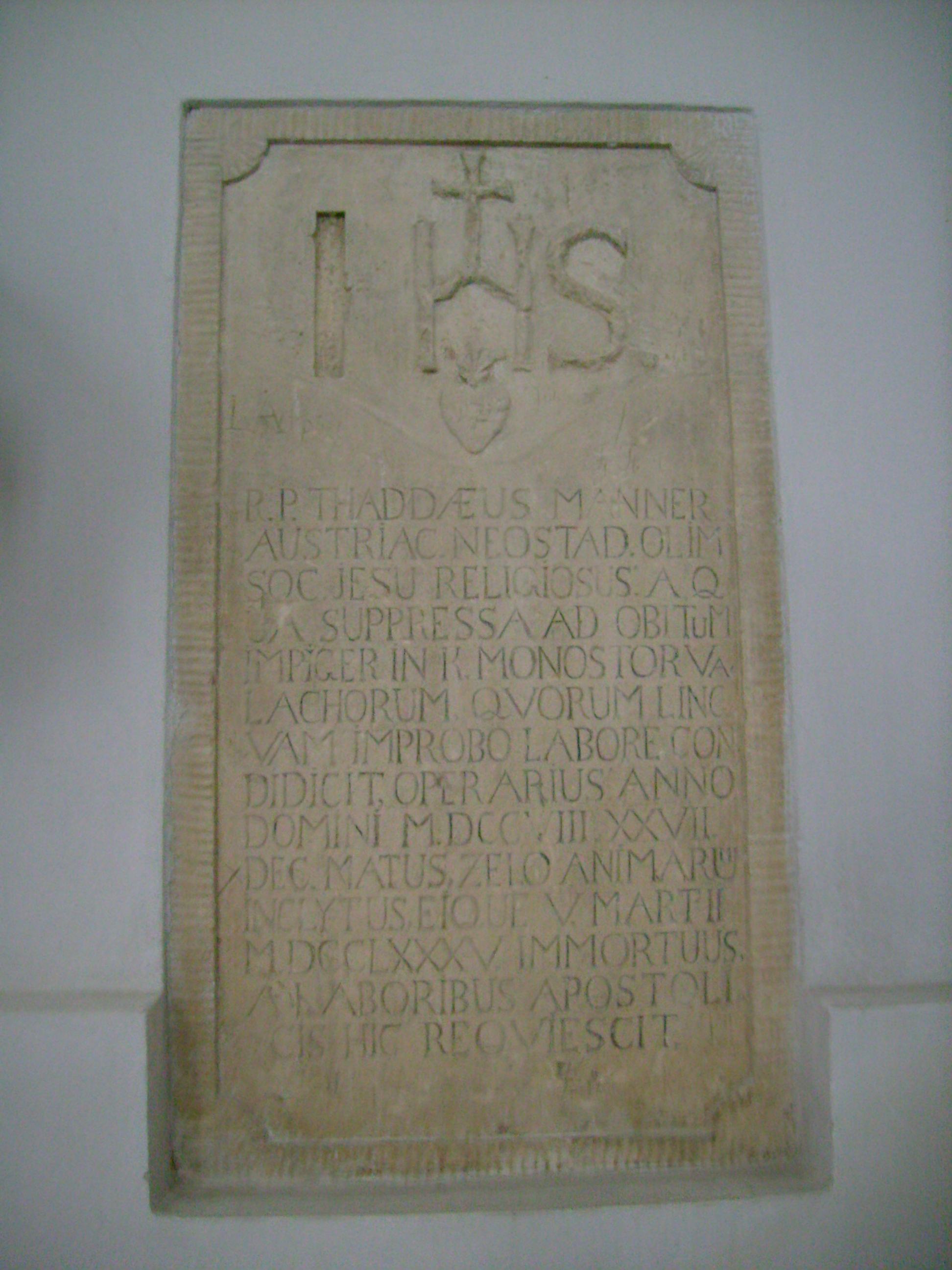 Gedenkstein des Jesuiten Manner. Innenraum der Kalvarienkirche, Klausenburg (Cluj, Kolozsvár).